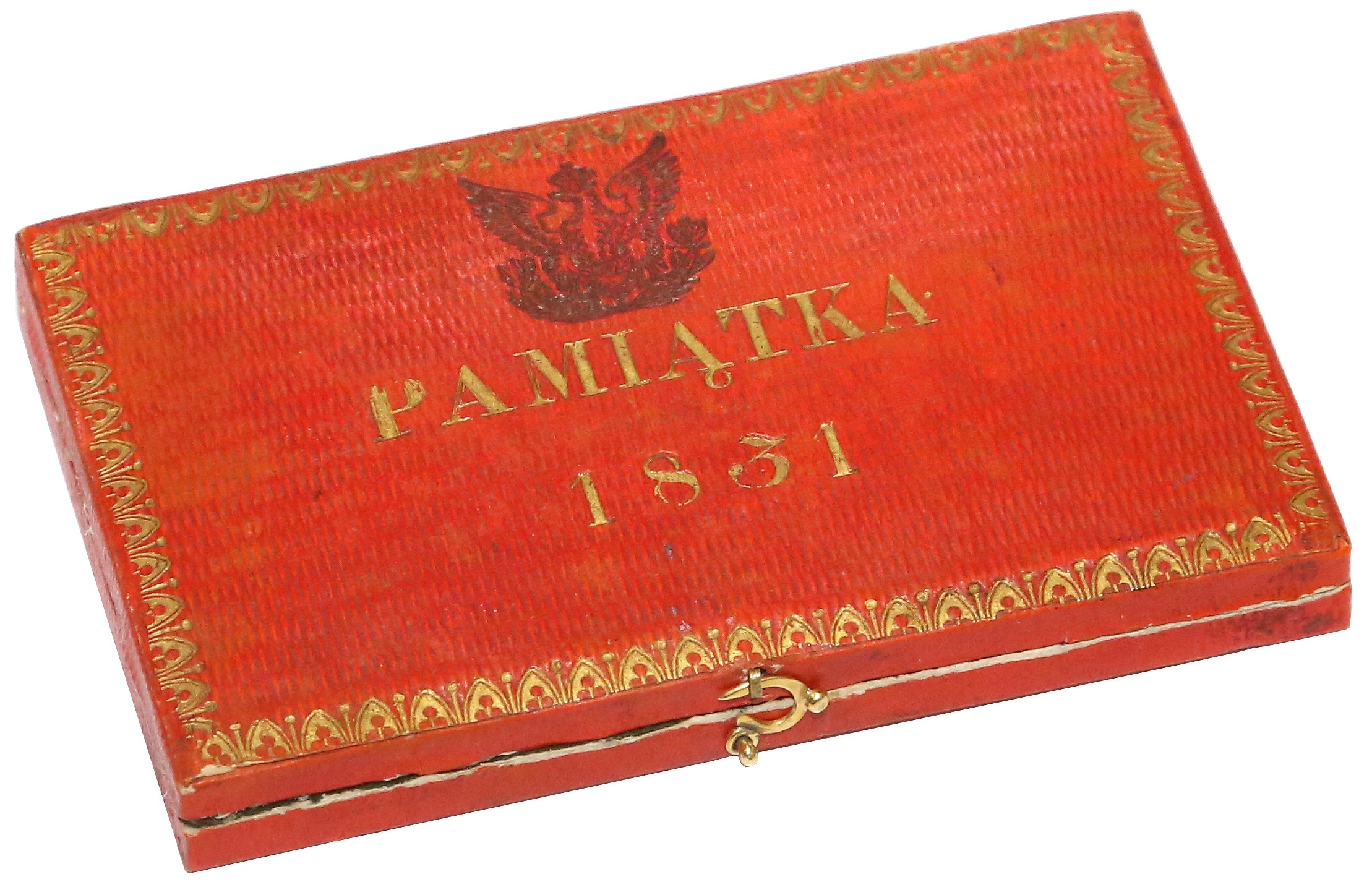 Pudełko pamiątkowe na monety i banknot powstania listopadowego 1831